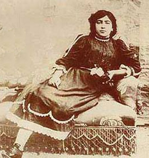 فاطمه برغانی (طاهره)